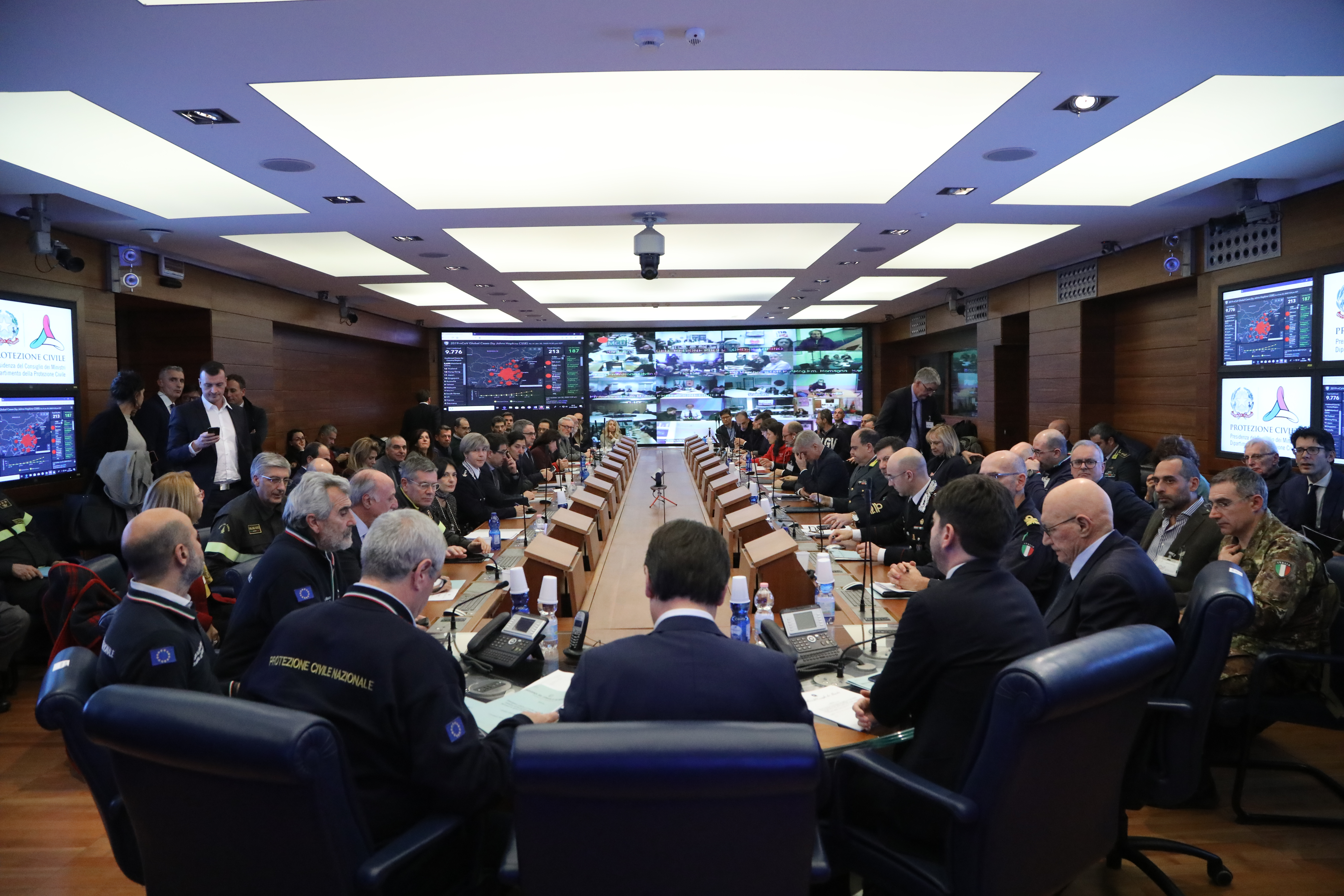 Roma, 31 gennaio 2020 – Il Presidente del Consiglio dei Ministri, Giuseppe Conte, presiede il Comitato Operativo della Protezione Civile convocato dal Capo del Dipartimento, Angelo Borrelli, in seguito allo stato d’emergenza dichiarato per il coronavirus. Presente anche il Ministro della Salute Roberto Speranza. Il Comitato Operativo assicura il coordinamento degli interventi di tutte le componenti e le strutture operative del Servizio Nazionale della Protezione Civile.